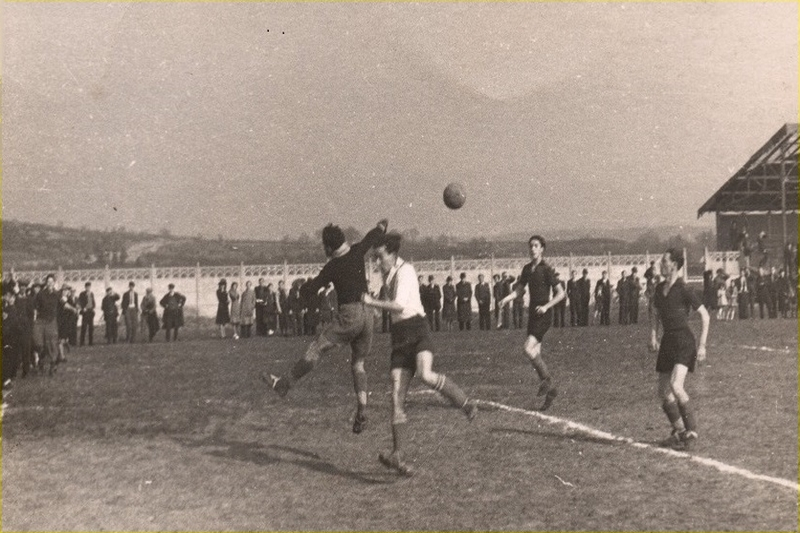 Match de football de l'équipe première du Racing-Club Vésulien qui se déroule au stade de Vesoul en 1942. Le gardien Gabriel Bruyat boxe le ballon sous la menace d'un attaquant adverse. Les défenseurs vésuliens Jean Baudry et Lasdislas Kudelka se replient.